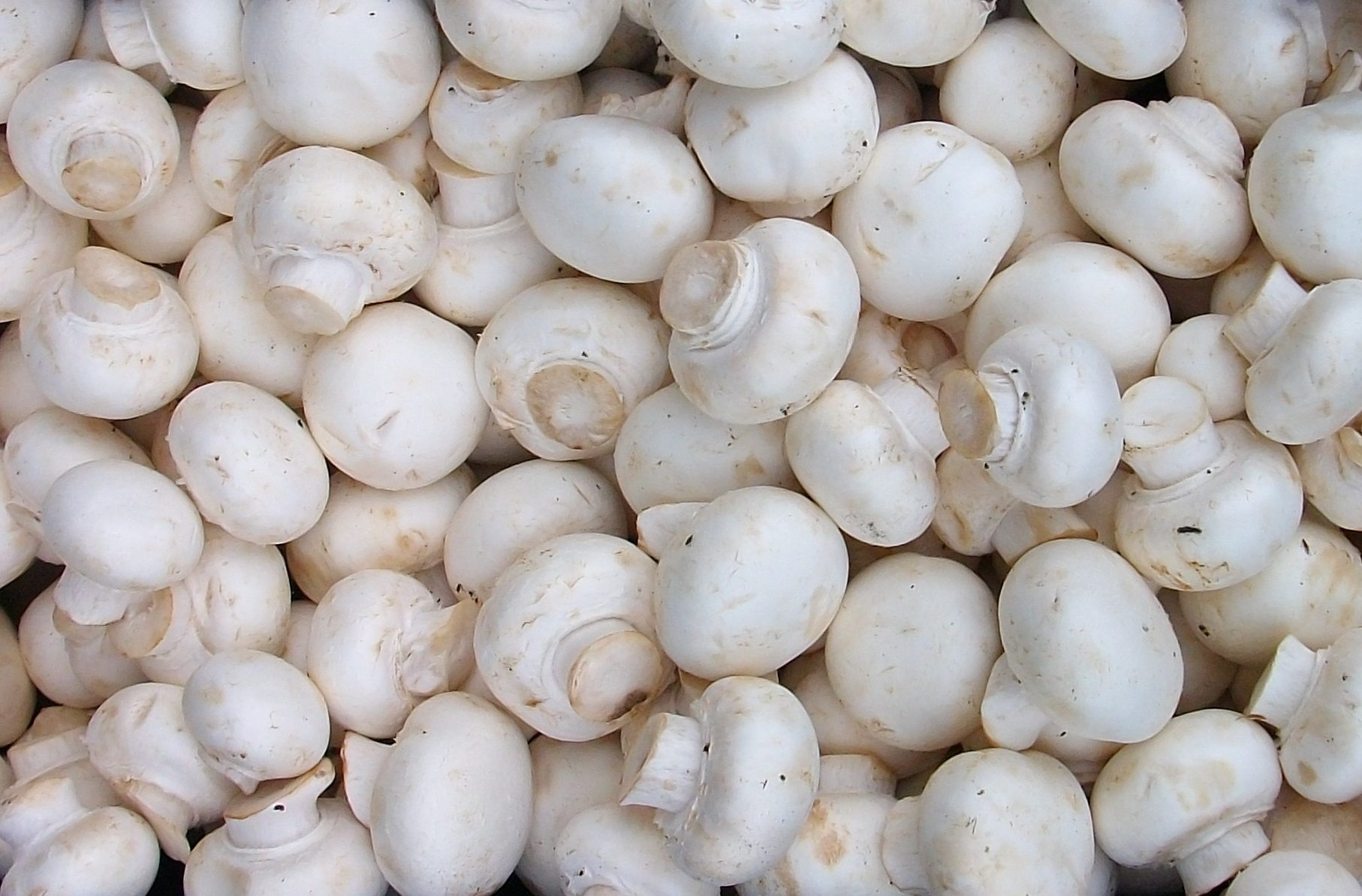 Der Zuchtchampignon (Agaricus bisporus) wird auch Zweisporiger Egerling genannt und ist der weltweit meistangebaute Speisepilz.